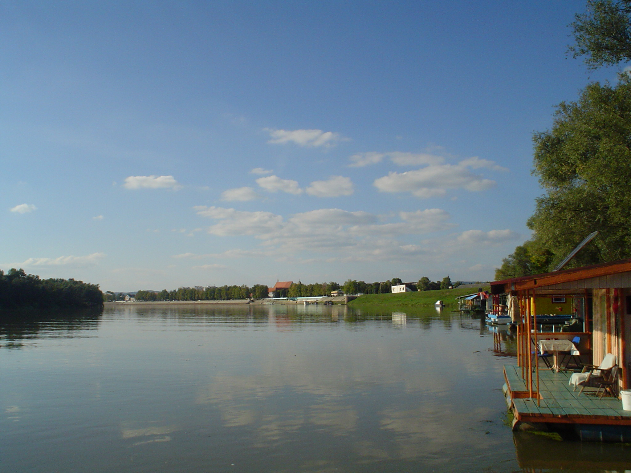 Slavonski Brod, rijeka Sava (pogled na kej)